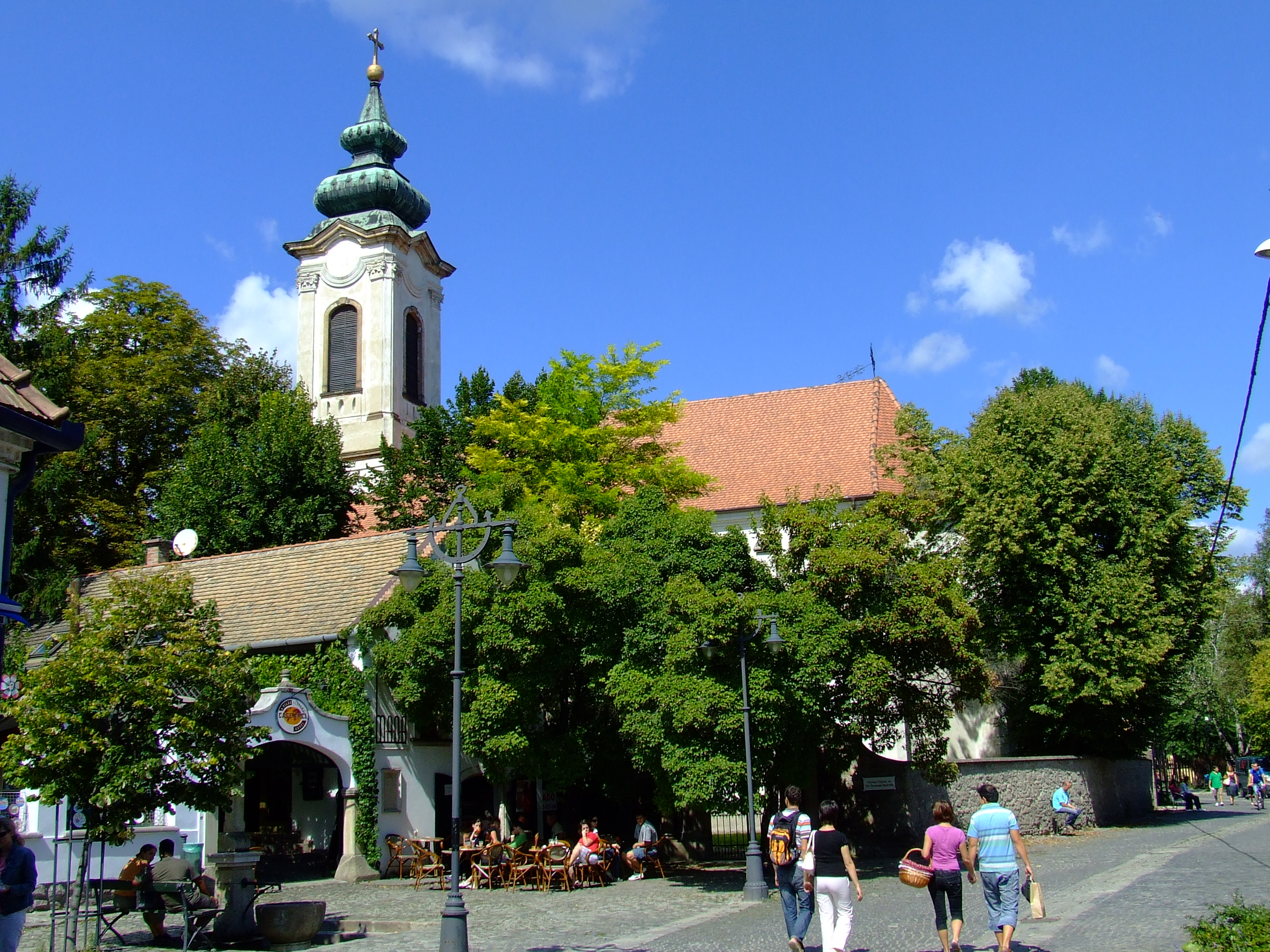 Preobrazsenszka-templom (Szentendre, Bogdányi út 42.) This is a photo of a monument in Hungary, Identifier: 7338